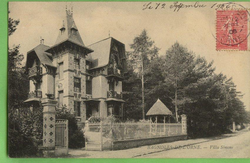 Villa La Tourelle à Bagnoles-de-l'Orne. Les plans furent publiés en 1904 dans la revue L'architecte.